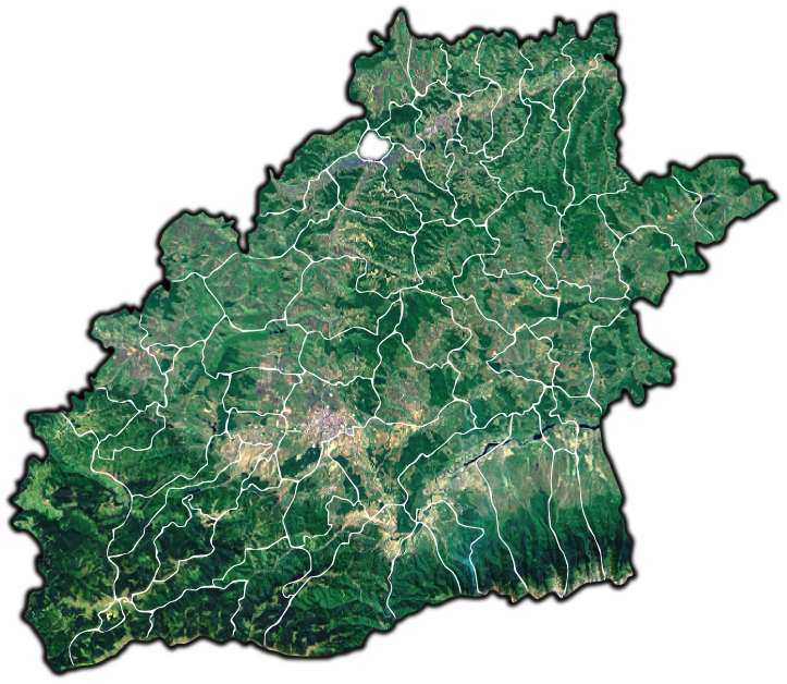 Copsa Mica jud Sibiu.